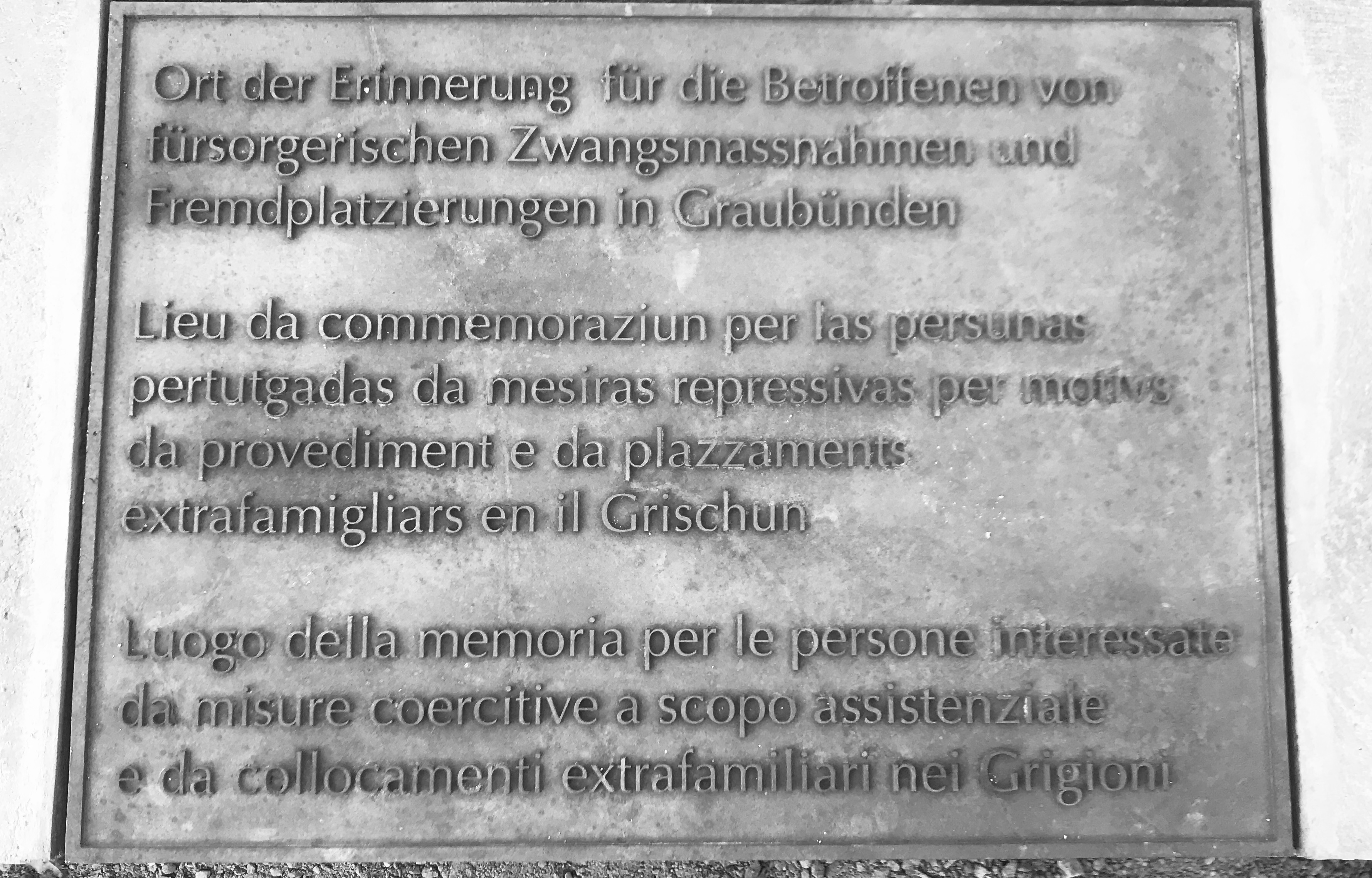 Foto der Gedenktafel welche am Platz des Gedenkens montiert ist